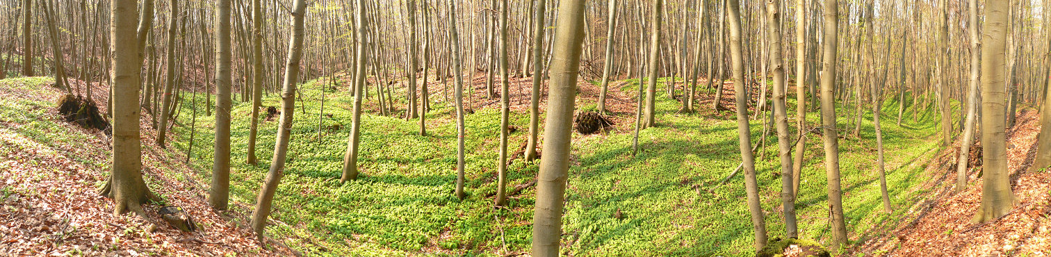 Wallreste und Burghügel der Warburg im Elm